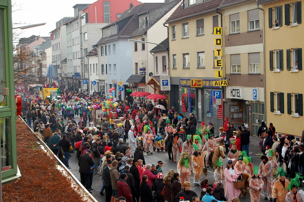 Rosenmontagsumzug in Neu-Isenburg 2008